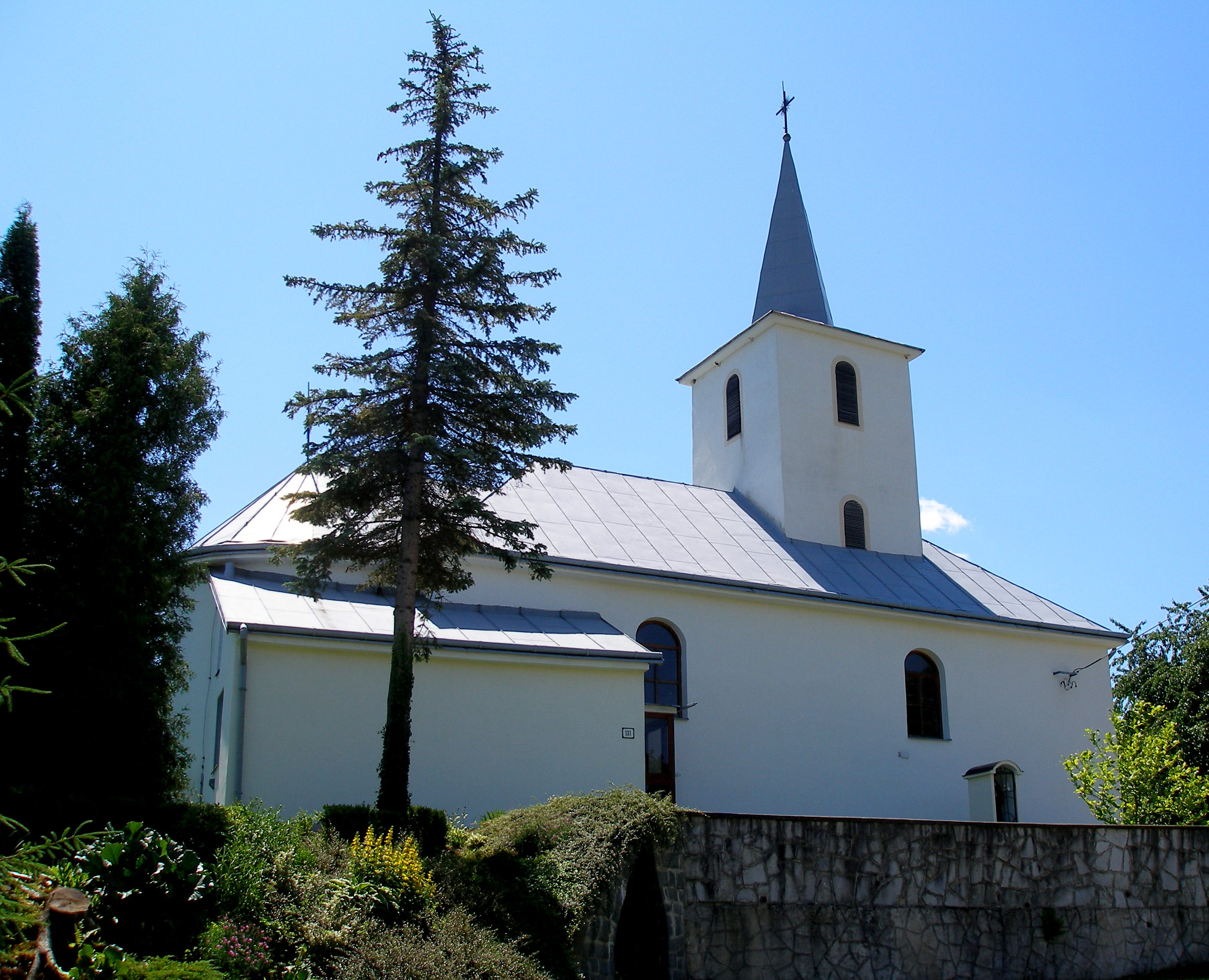 Obec Jakubova Voľa okres Sabinov This medium shows the protected monument with the number 708-302/0 in the Slovak Republic.